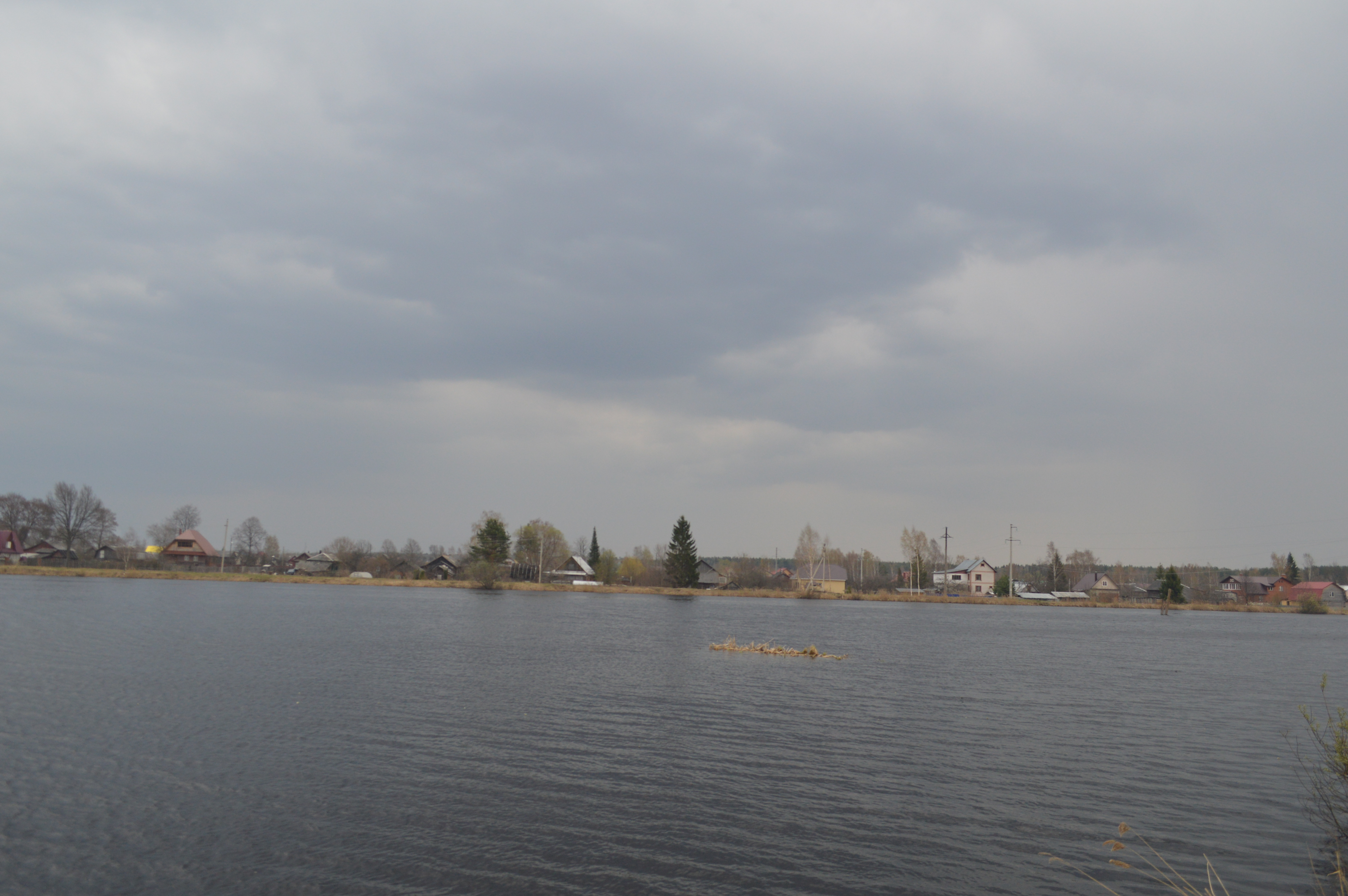 Пруд на Куновке в посёлке Запрудня.